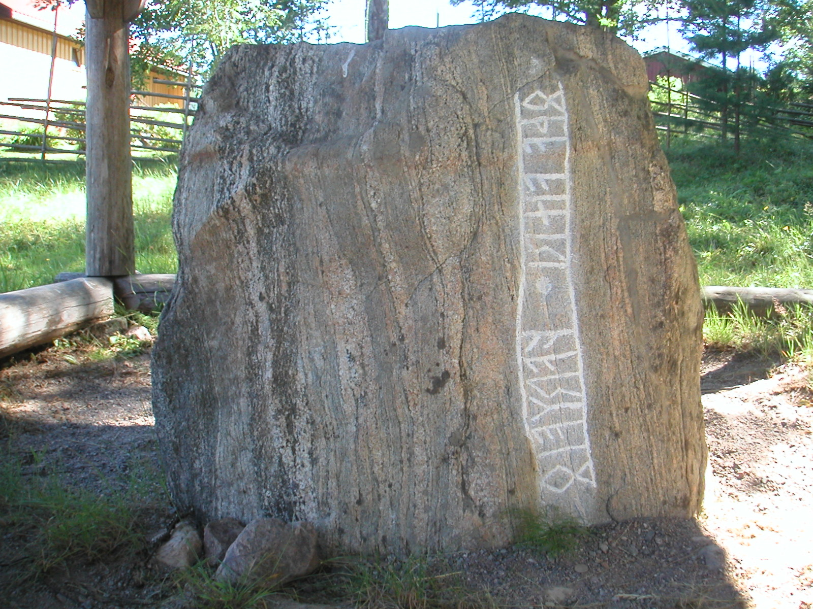 Skramlestenen (Vr NOR1994;27) i Värmland.